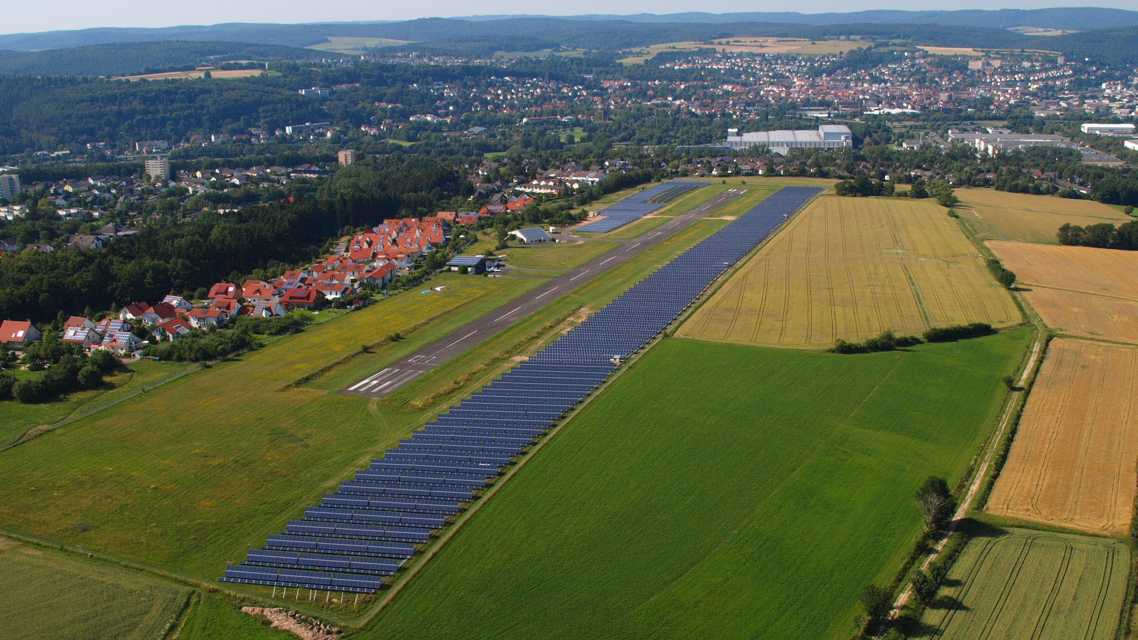 Bad Hersfeld, Flugplatz Johannesberg, Luftaufnahme (2011)